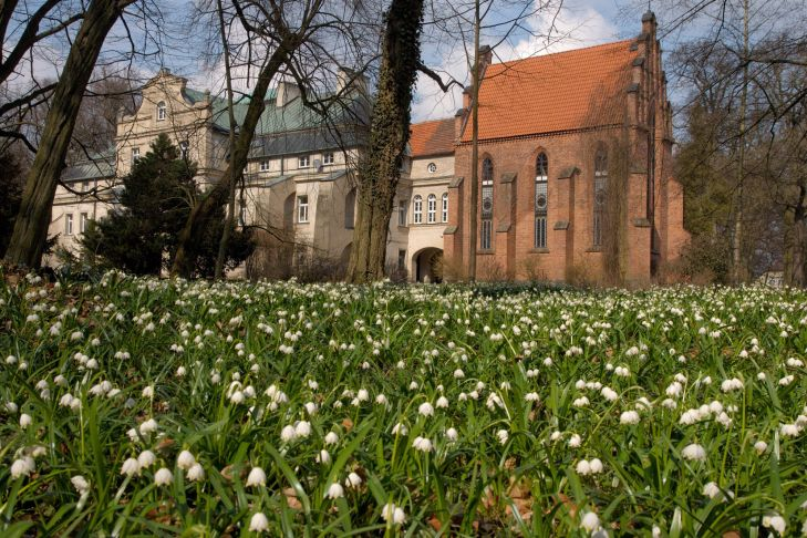 Pałac Dezyderego Chłapowskiego w Turwi. Śnieżycowy dywan